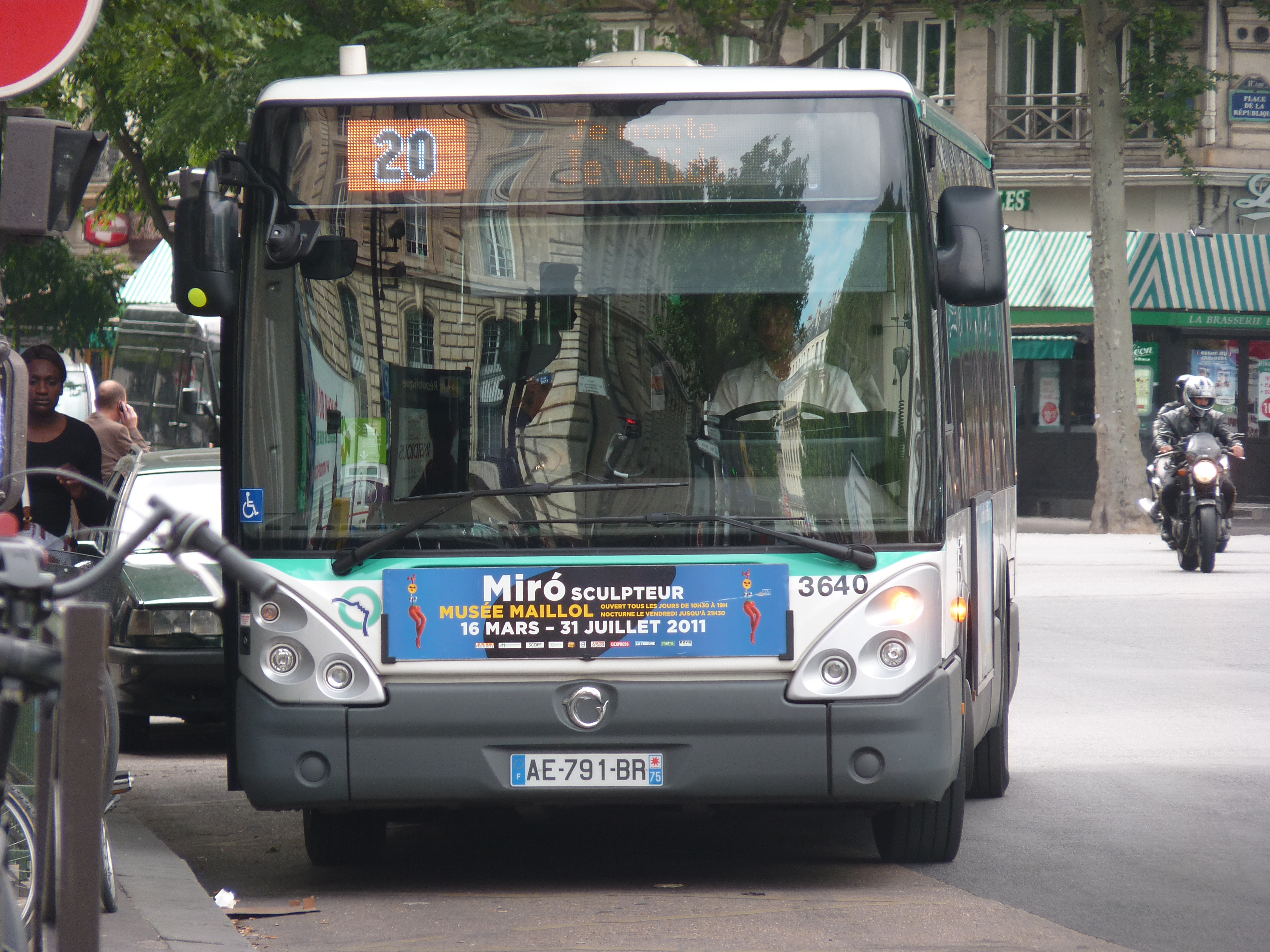 Un Citelis Line de la ligne 20 du réseau de bus de la RATP à la place de la République.